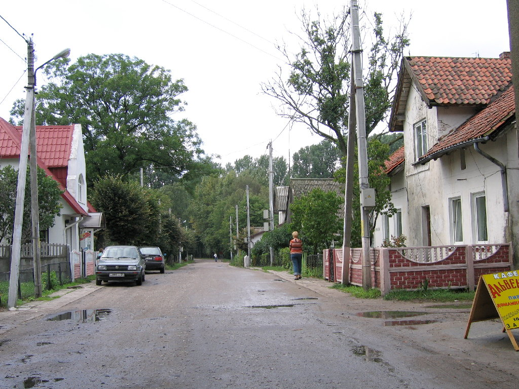 Rossitten, 23-Aug-2006